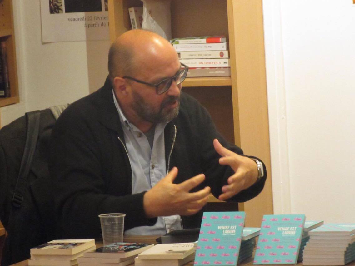 Photo de Roberto Ferrucci prise lors d'une rencontre en librairie chez Charybde en 2016